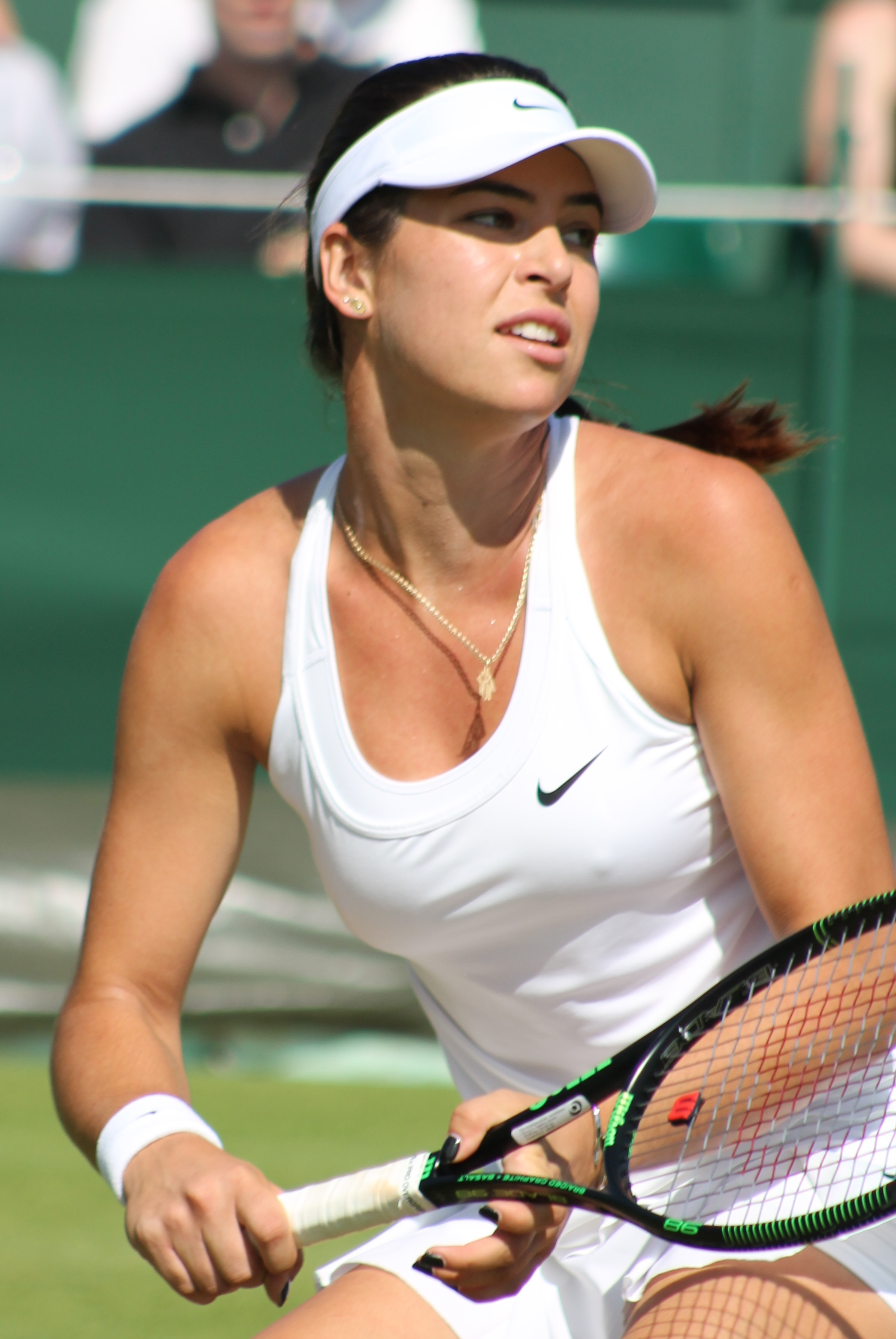 Tomljanovic WM15 (6)